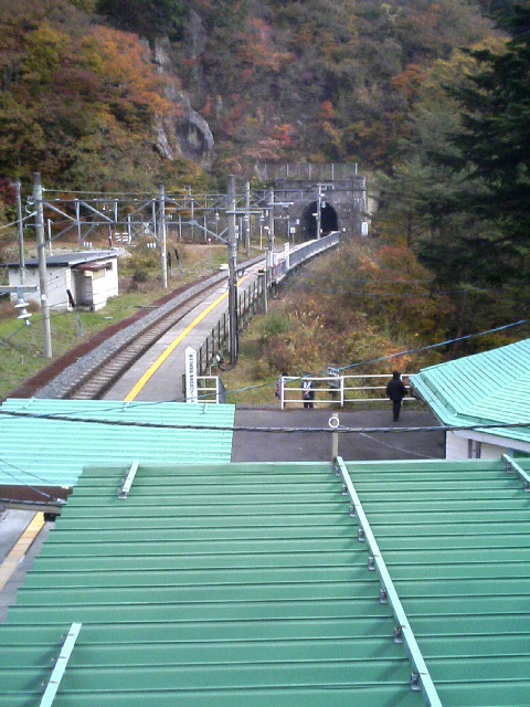 面白山高原駅